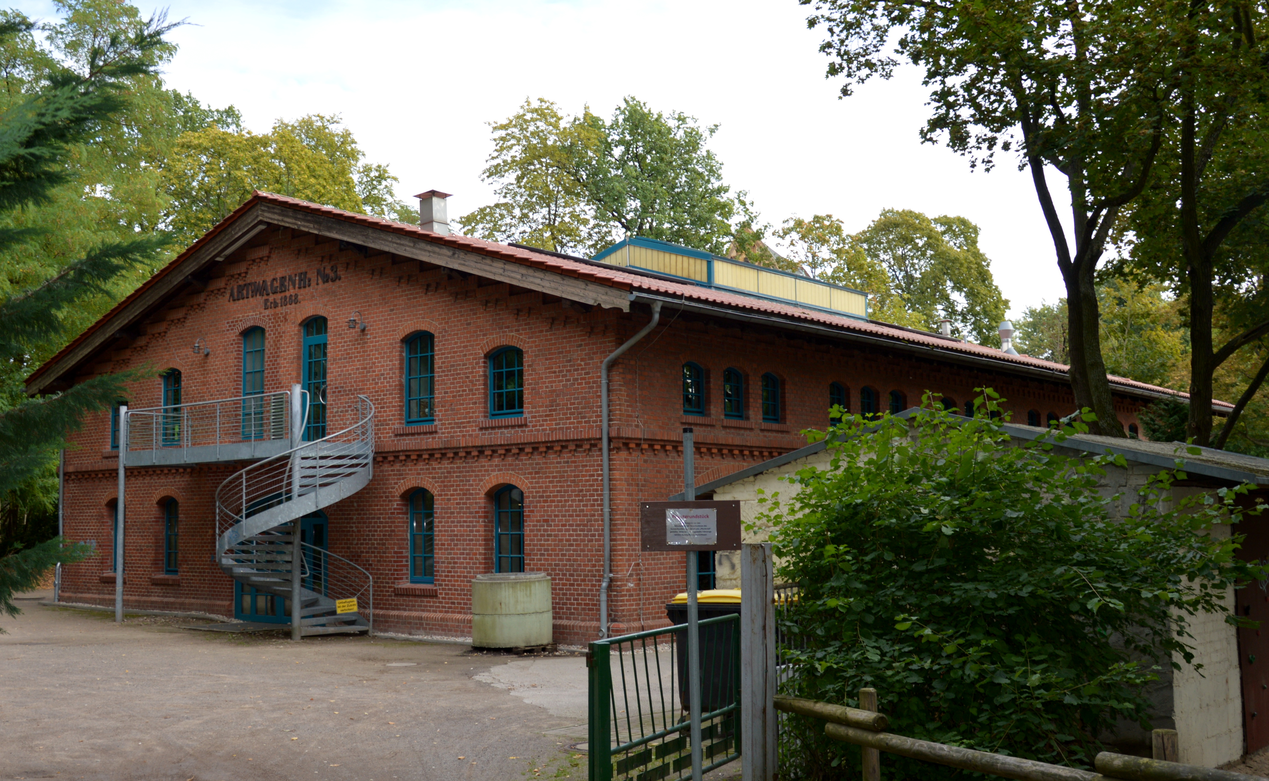 Haus Neustraße 10c in Wittenberg